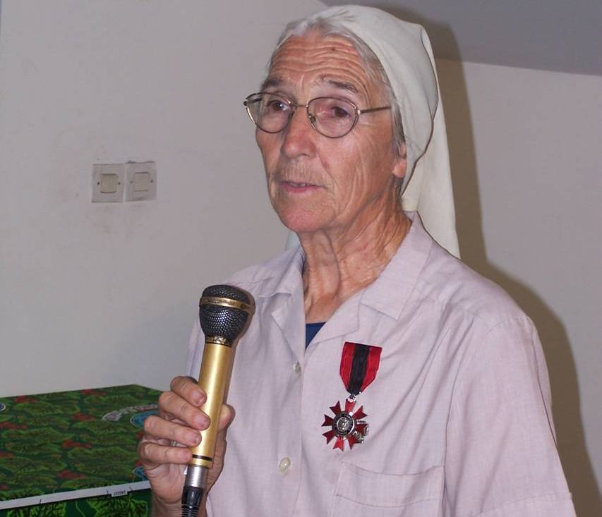 Soeur Marguerite reçevant l'Ordre du Mérite congolais